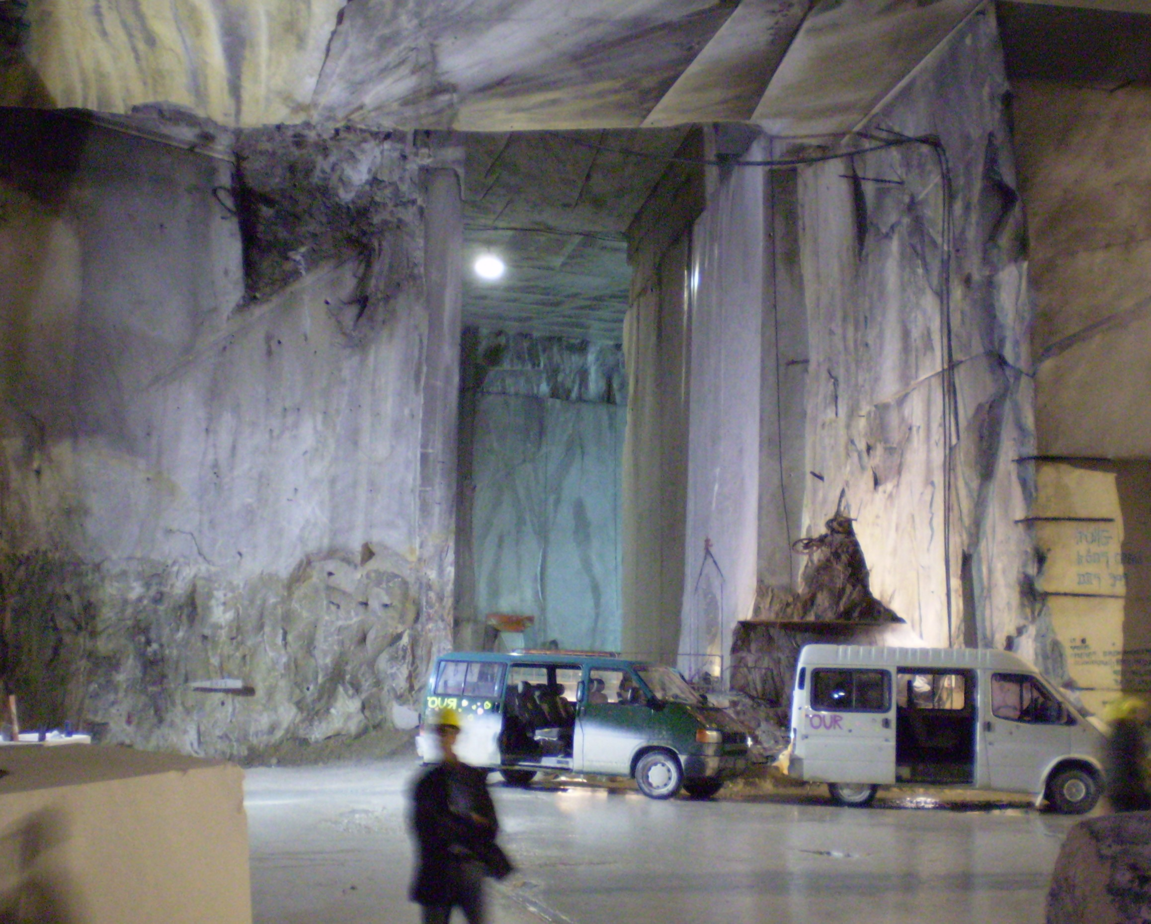 Marble quarry at Carrara, Province Massa-Carrara, Italy. Bacino di Fantiscritti, Galleria Ravaccione